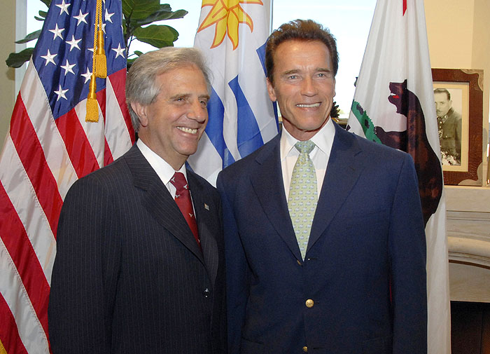 Presidente Tabaré Vázquez y gobernador de California Schwarzenegger.